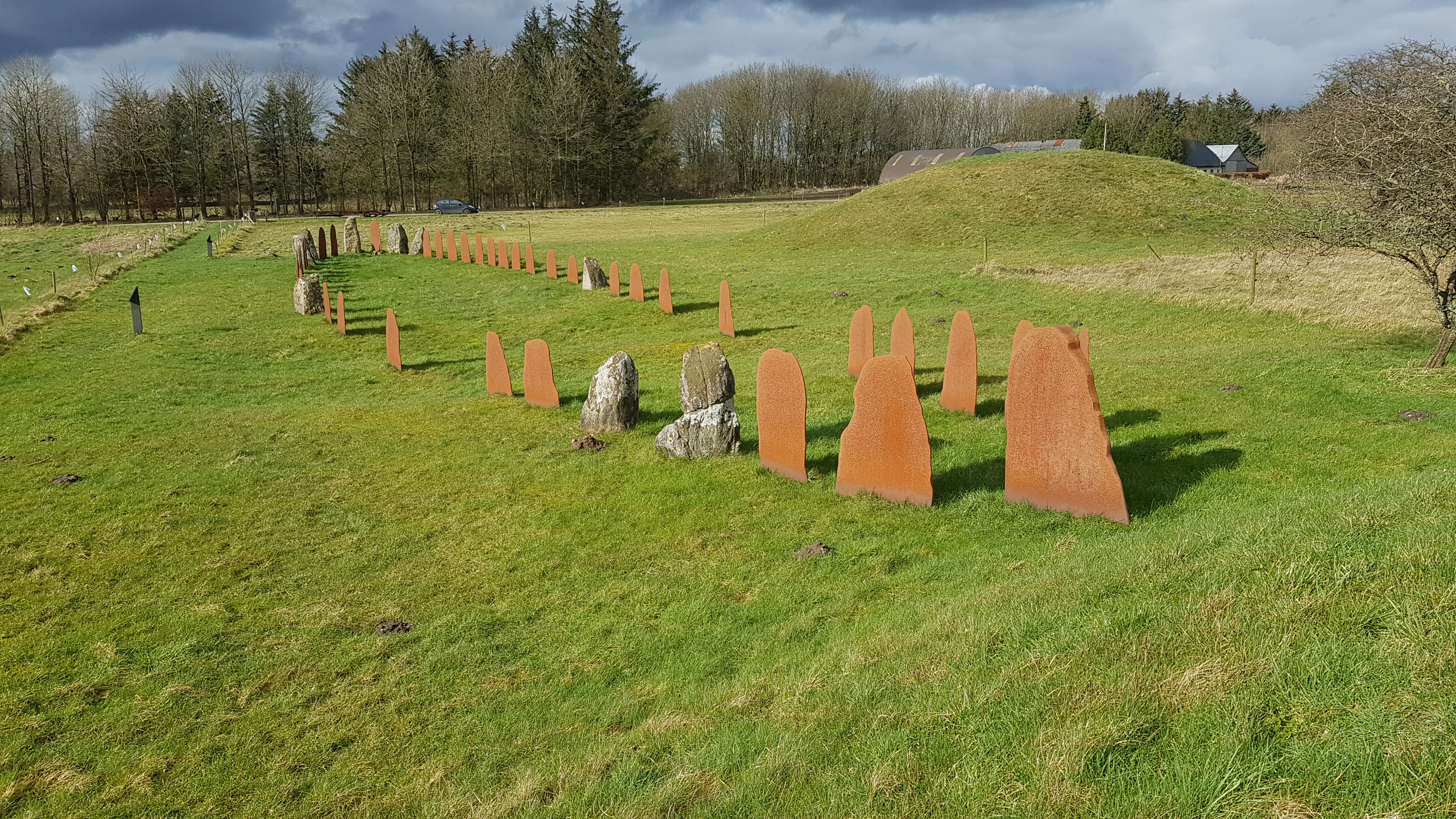 Klebæk Høje